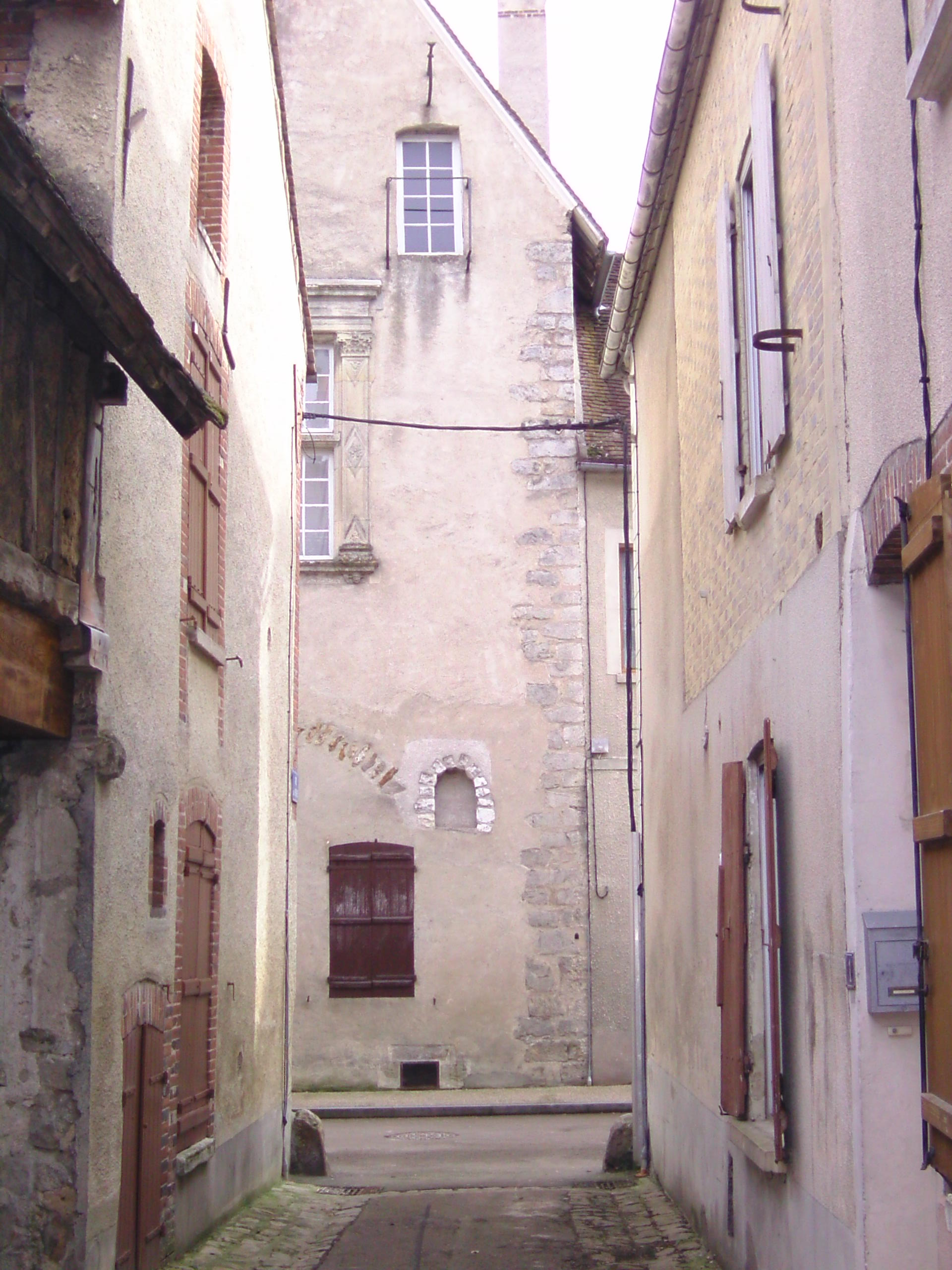 Maison du dernier gouverneur de Saint Julien avant la révolution française